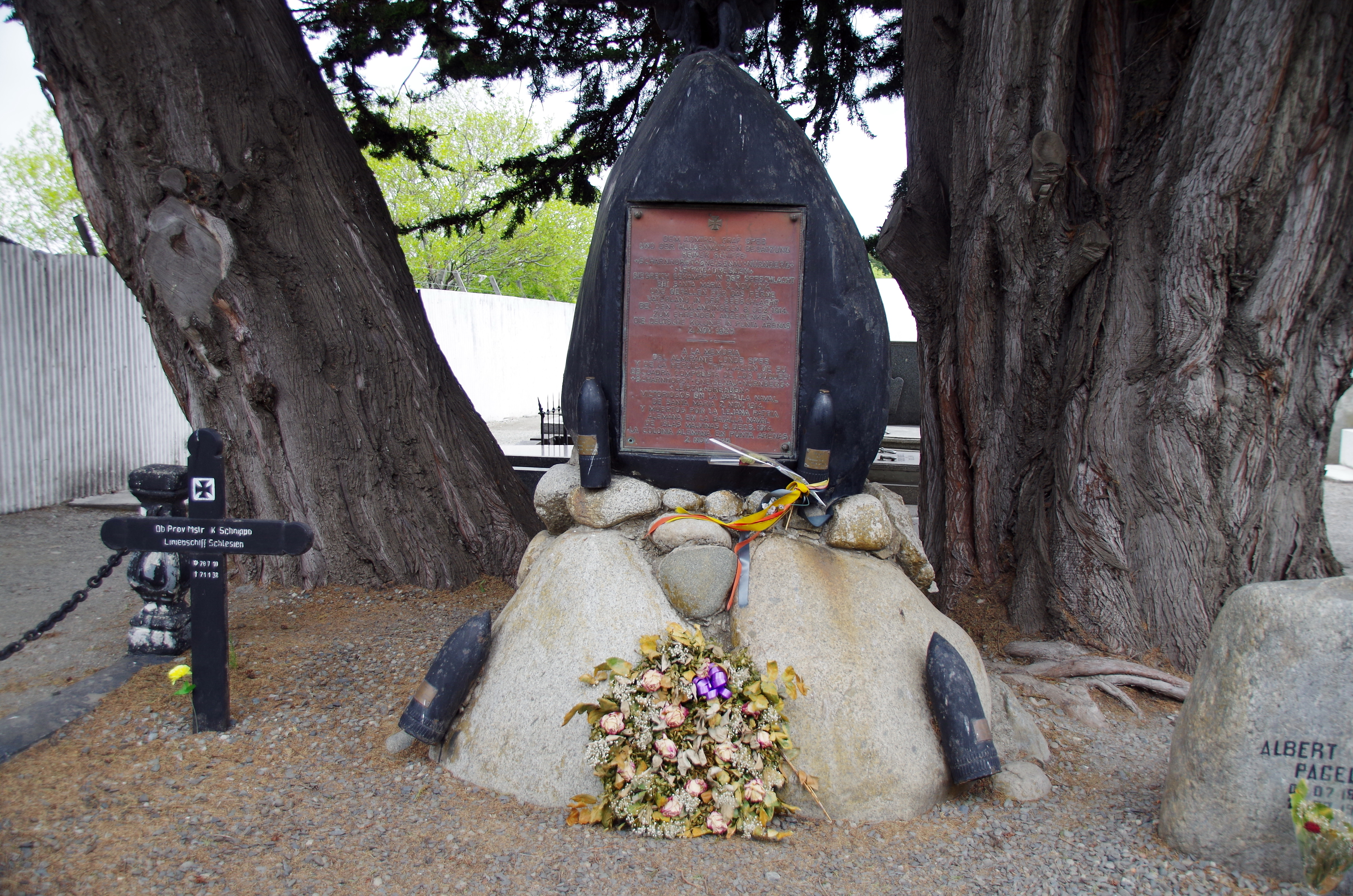 Gedenkstätte Graf Spee